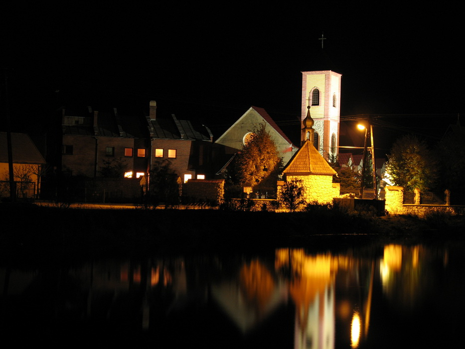 Jelna - kościół